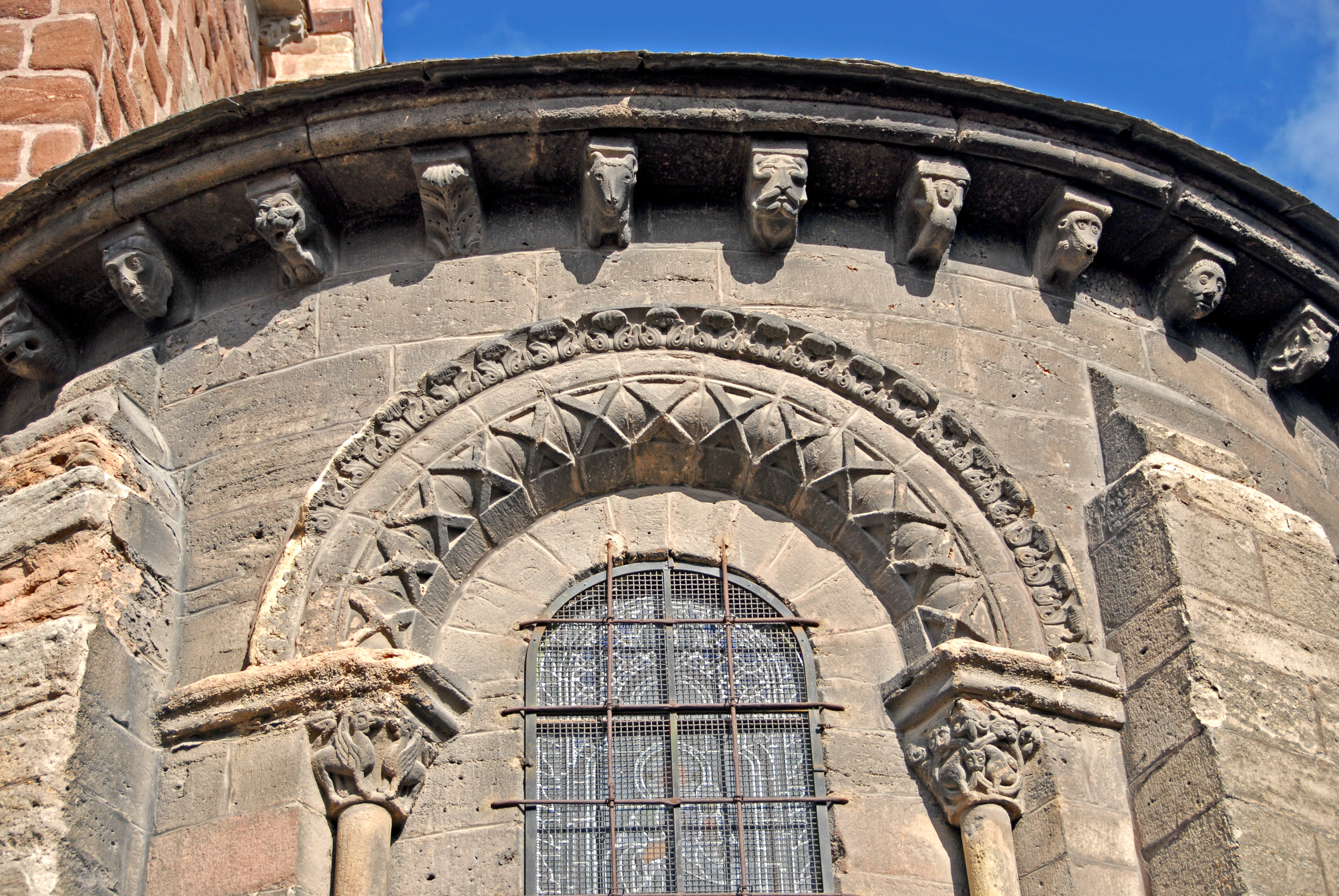 St.-Julien Brioude, südöstl. Kranzkapelle Archivolte